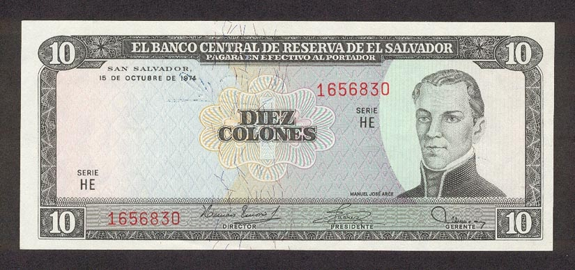 Antiguo colon con la imagen de Arce